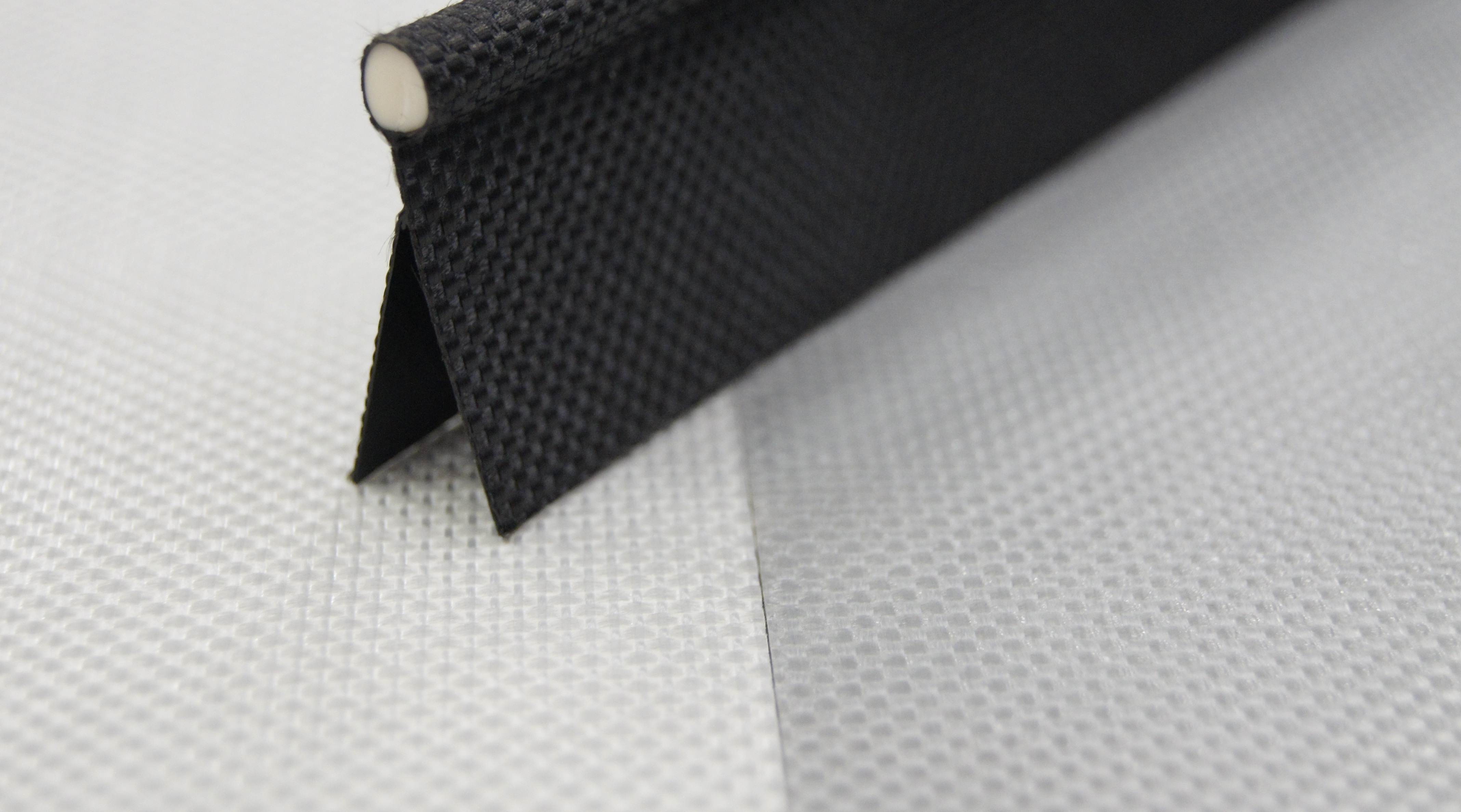 voorbeeld van een pees